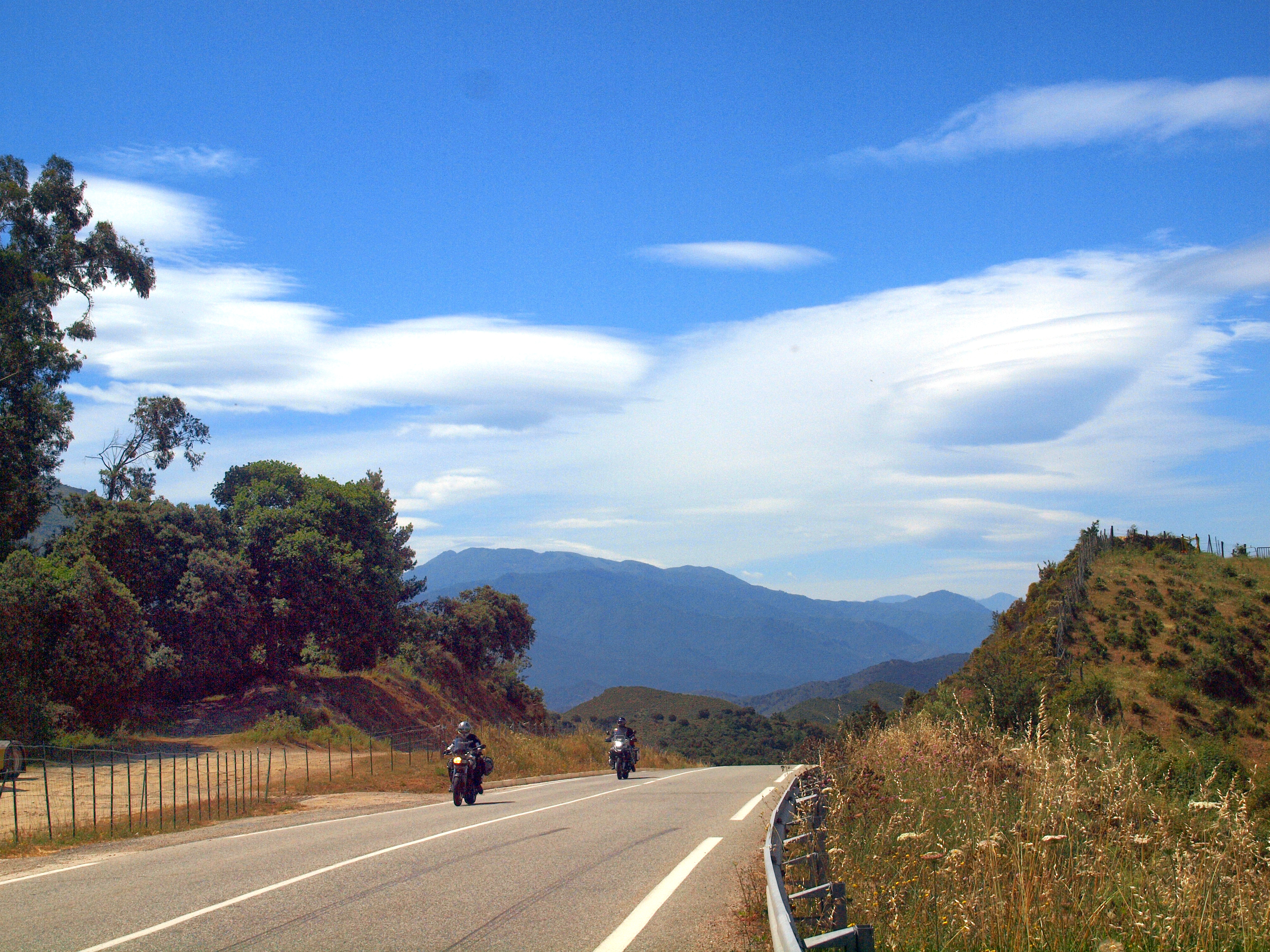 Pietralba, Balagne (!Corse) - La Balanina (RN 197) au col de Sainte-Marie, versant sud